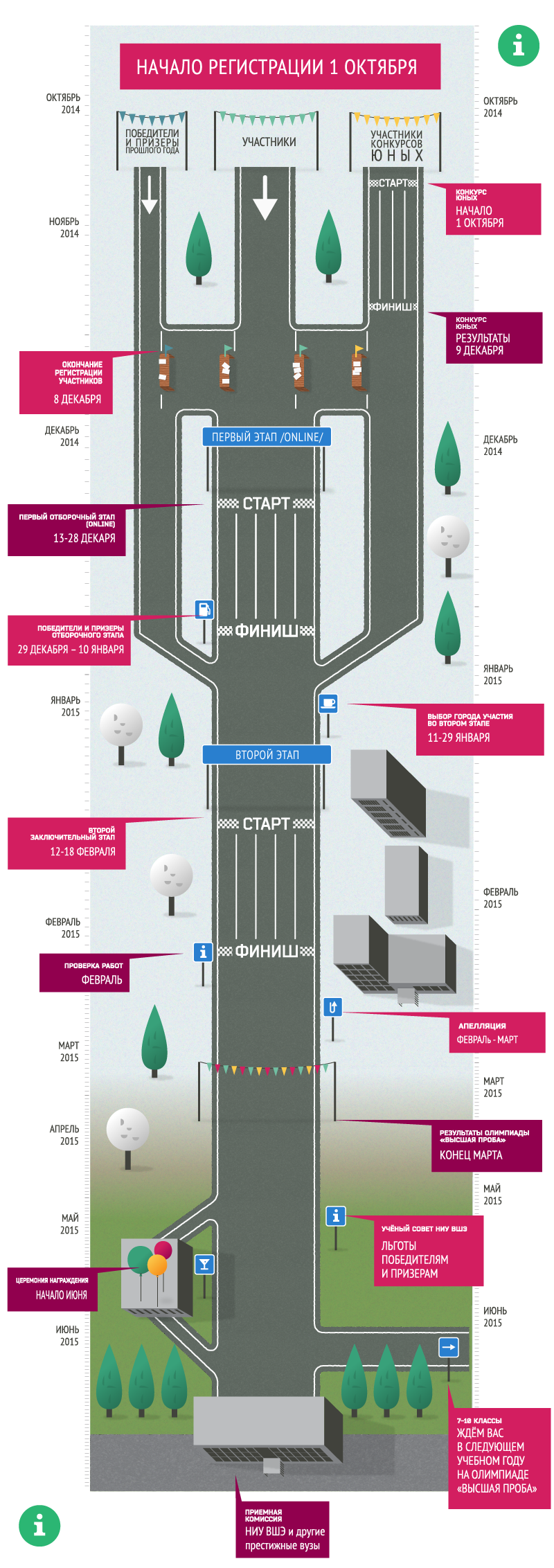 Карта олимпиады "Высшая проба", наглядно показывающая последовательность этапов олимпиады.